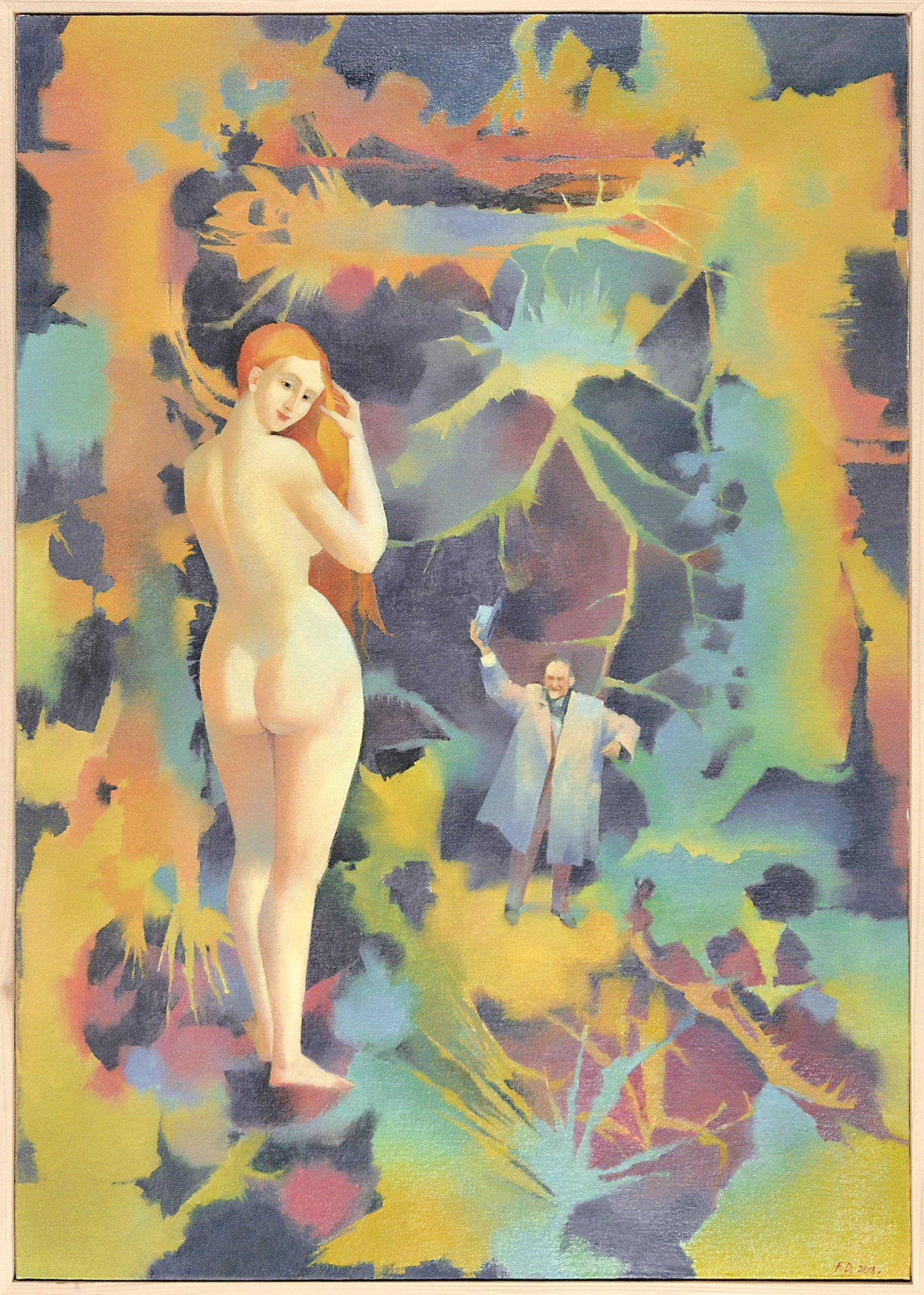 2013, Öl auf Leinen, 100x70cm